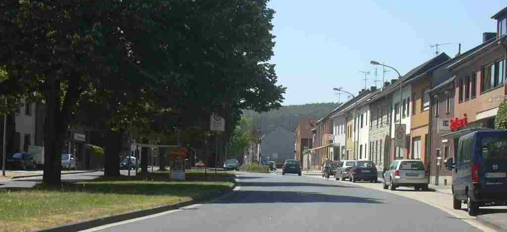 Schlich, Hauptdurchgangsstraße Own Work papa1234 2006-07-14